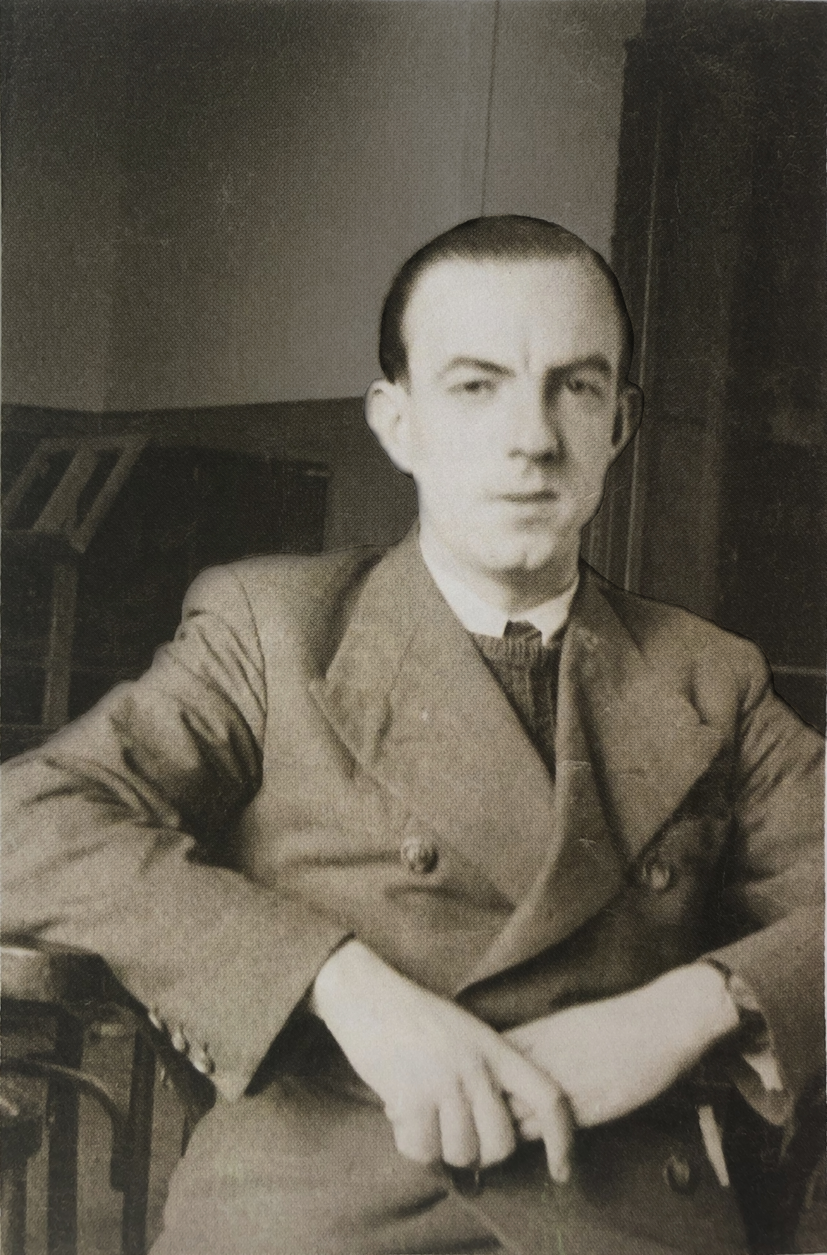 Prior de la refundación de la Cofradía de la Santa Columna